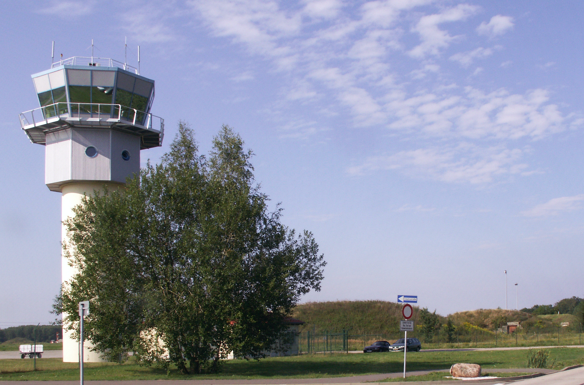 Der neue Flughafen-Tower der Betriebs GmbH und dahinter drei der ehemaligen 40 Stück Bogendeckungen AU-11 aus DDR-Zeiten am Flugplatz Altenburg-Nobitz - Foto Wolfgang Pehlemann PICT0336